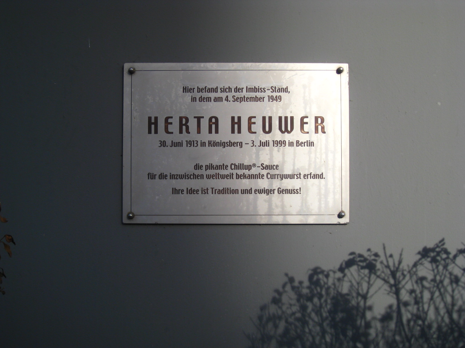 Gedenktafel für Herta Heuwer in Kantstraße 101 Berlin. Sie wird als die Erfinderin von Berliner Currywurst bekannt.